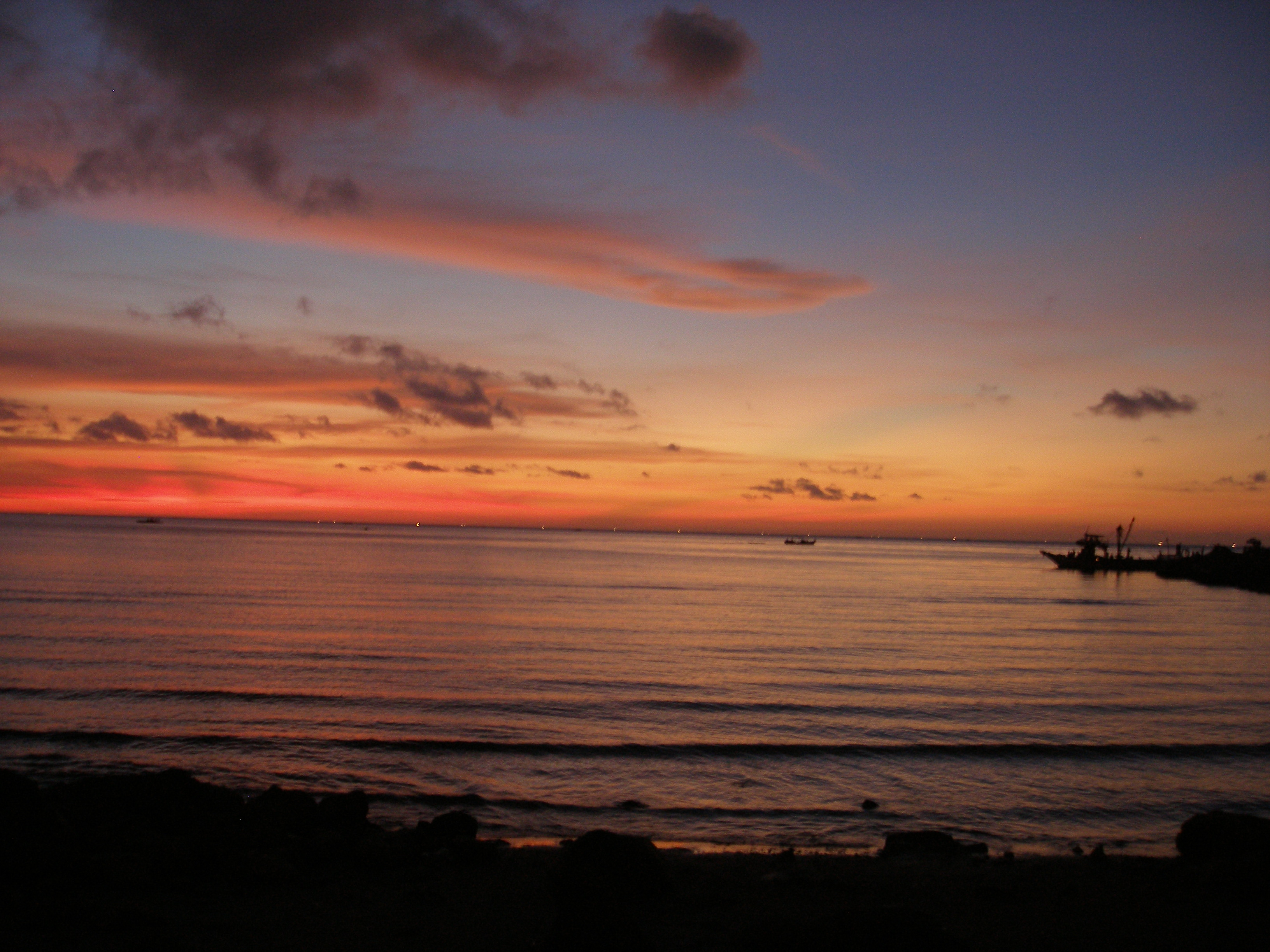 Sunset at Dipolog City Philippines